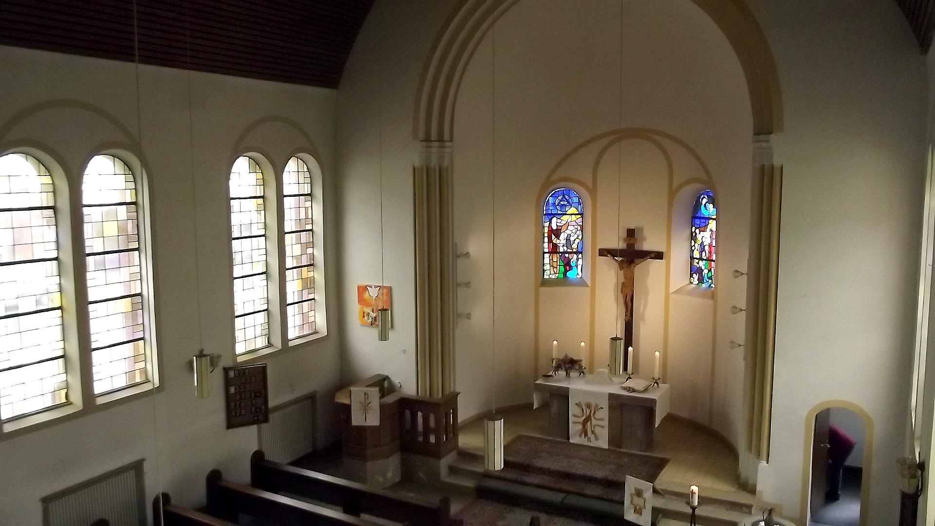 Interior of the lutheran church in Saarbrücken, Saarland, Germany